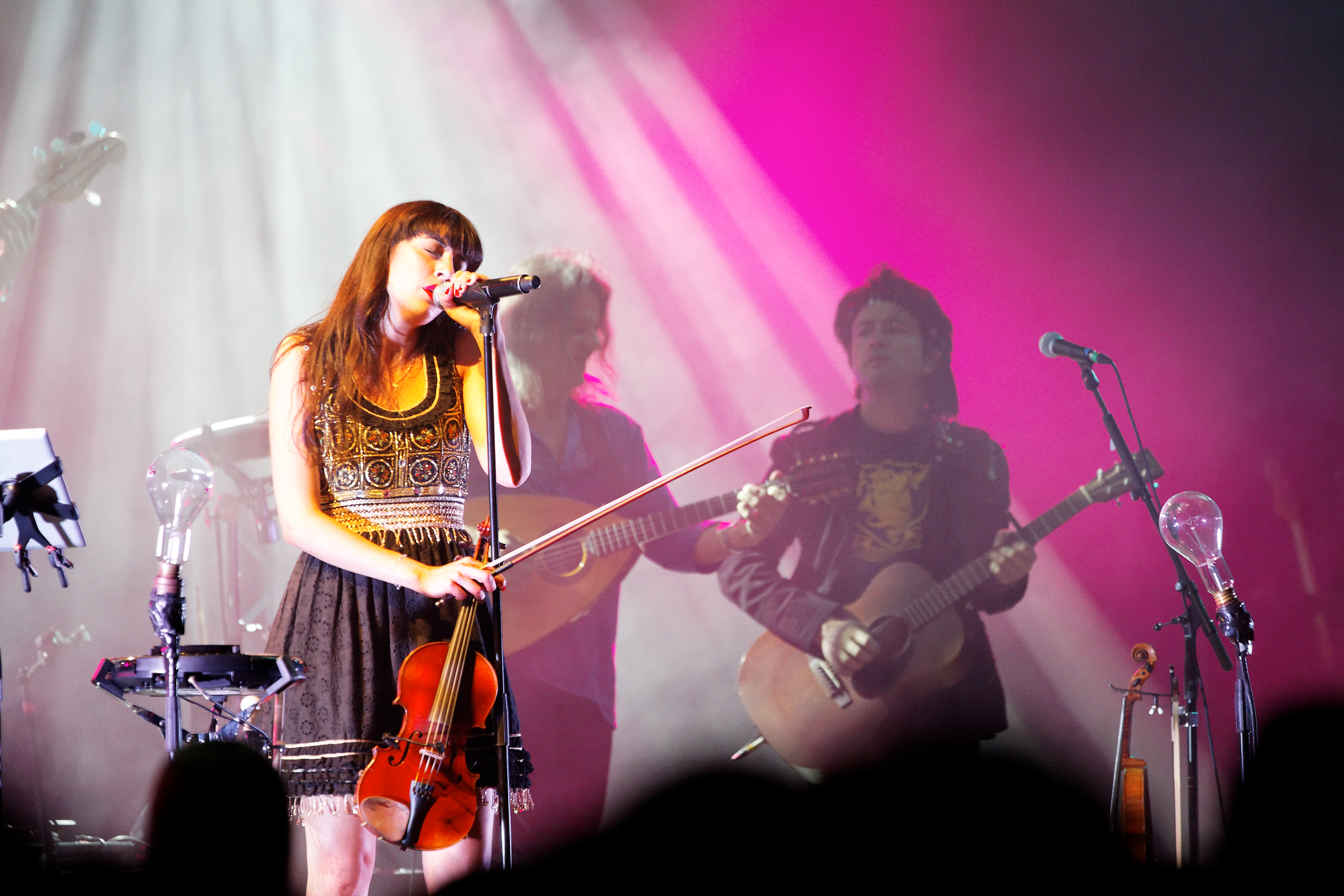 Nolwenn Leroy en concert le 22 juillet lors du festival de Cornouaille 2011.